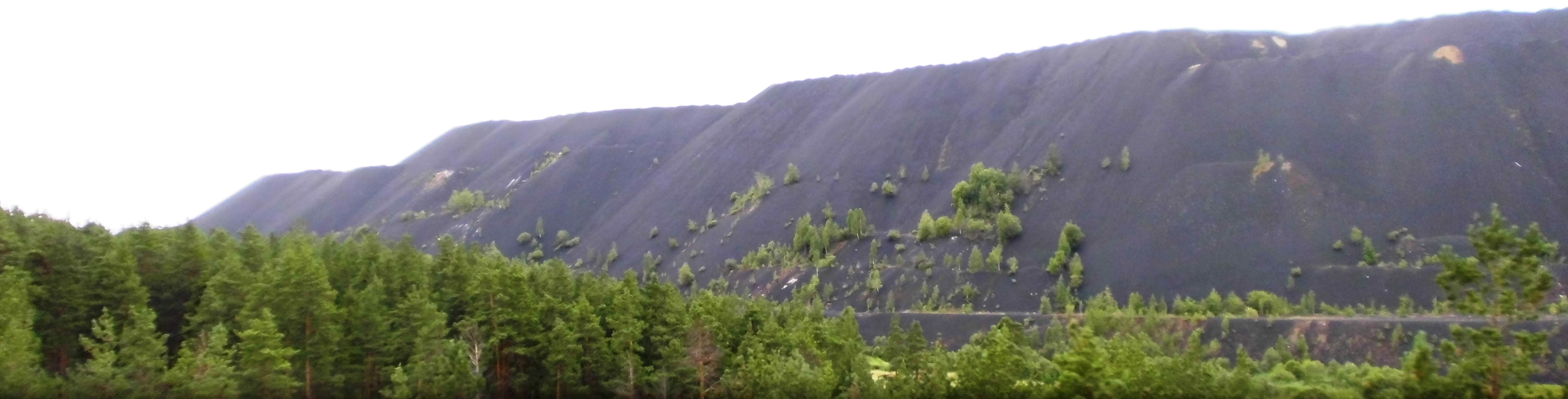 Шлаковые отвалы производства никеля на комбинате в г. Верхнем Уфалее.